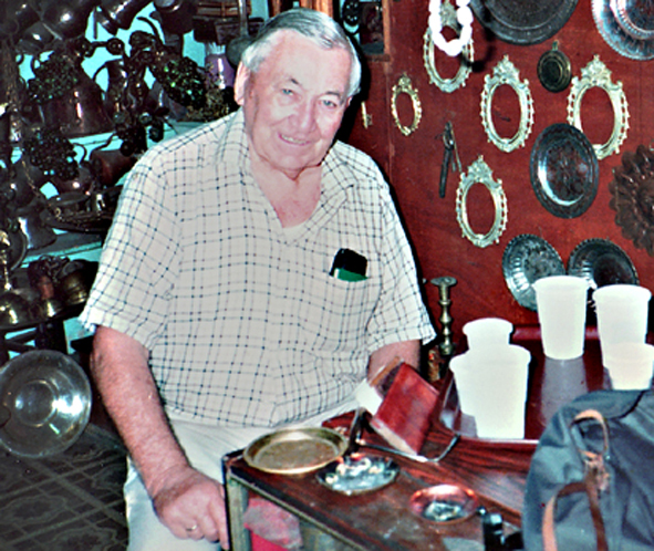 Alfons Abel, im Alter von 75 Jahren, in der Plaka von Athen.